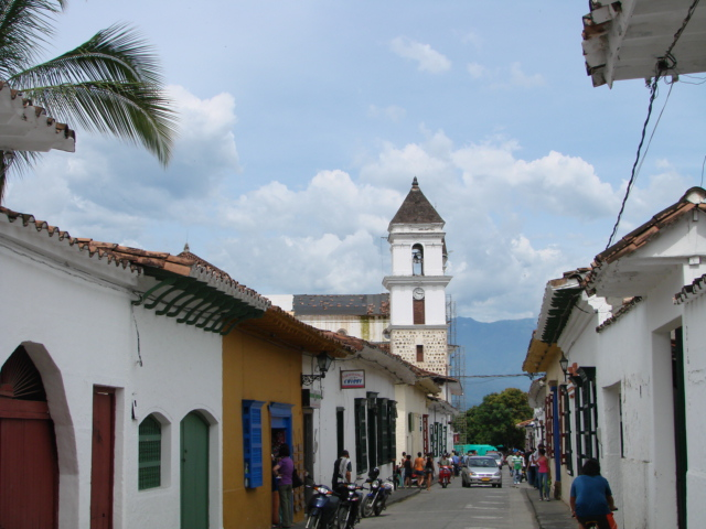 Vista de una calle típica de Santa Fe de Antioquia hacia la Catedral